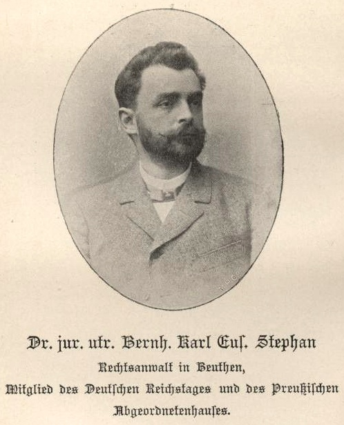 Bernhard Karl Eusebius Stephan (1855-1914) Reichstags- unbd Preuss. Landttagsabgeordneter, Zentrum